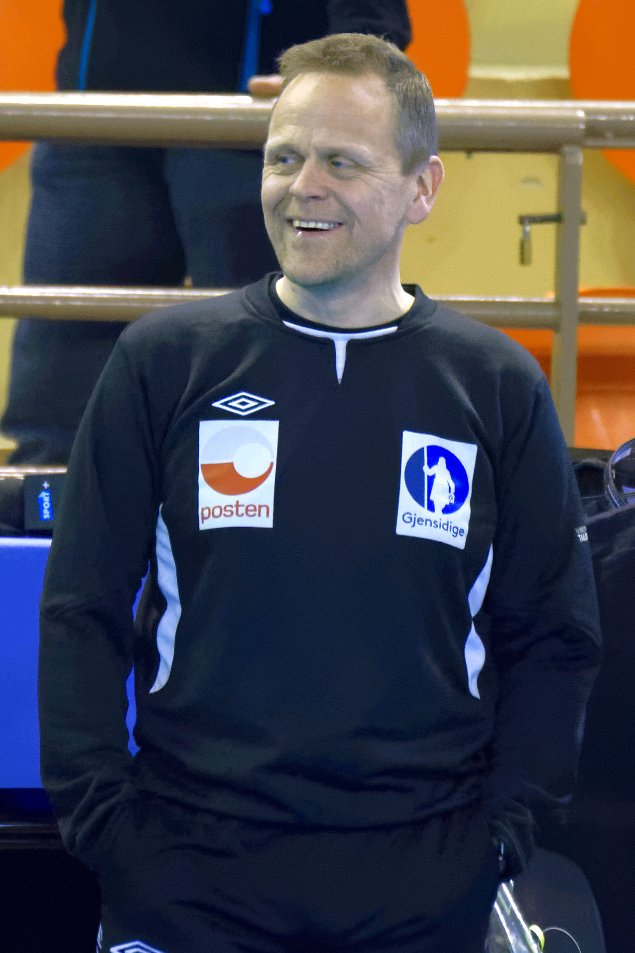 Thorir Hergeirsson, sélectionneur et entraîneur de l'équipe féminine de Norvège de handball. Lors du match Norvège / Pologne pendant la Golden League, le 19 mars 2015.